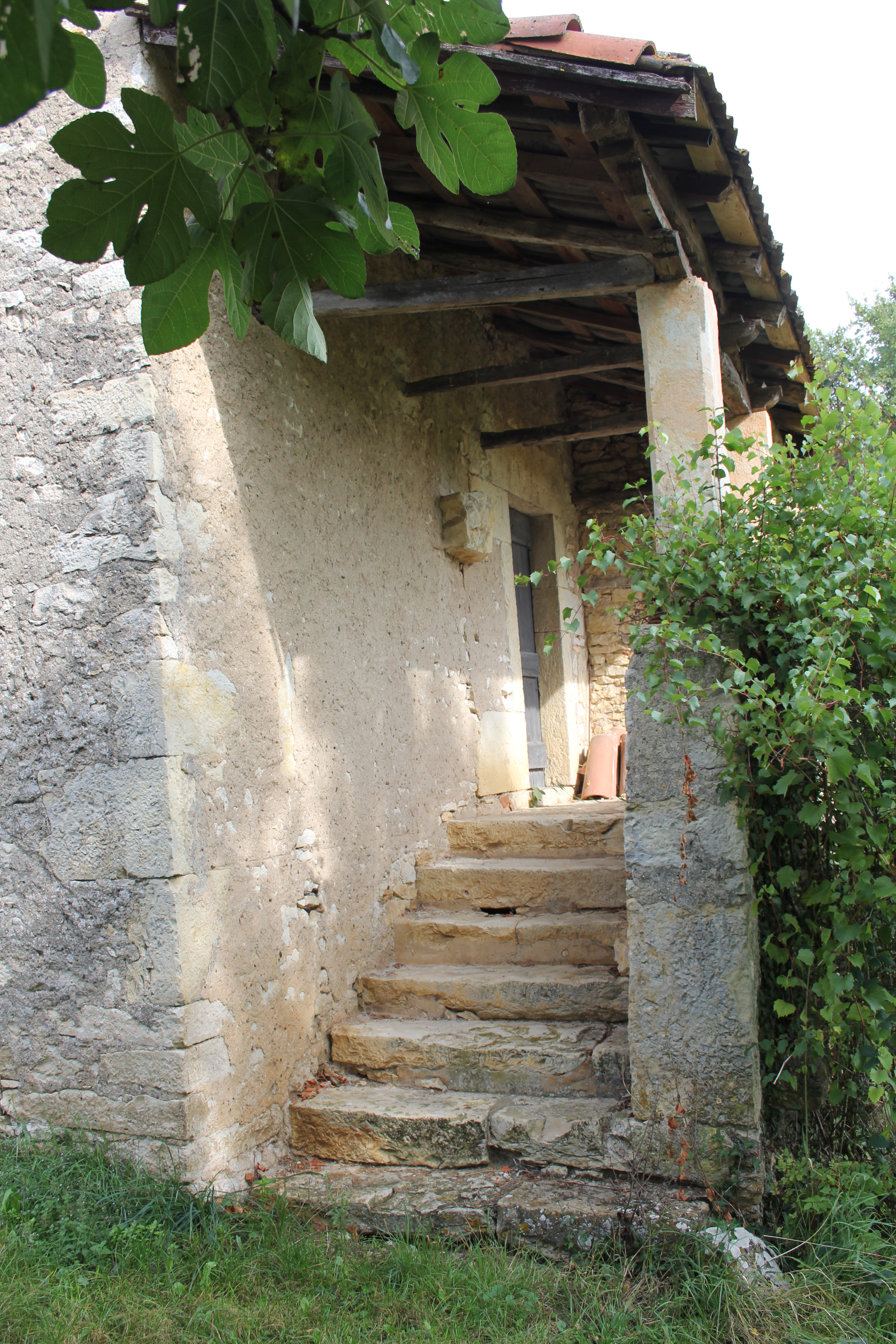 Maison de style Quercynois avec perron sous auvent (bolet)